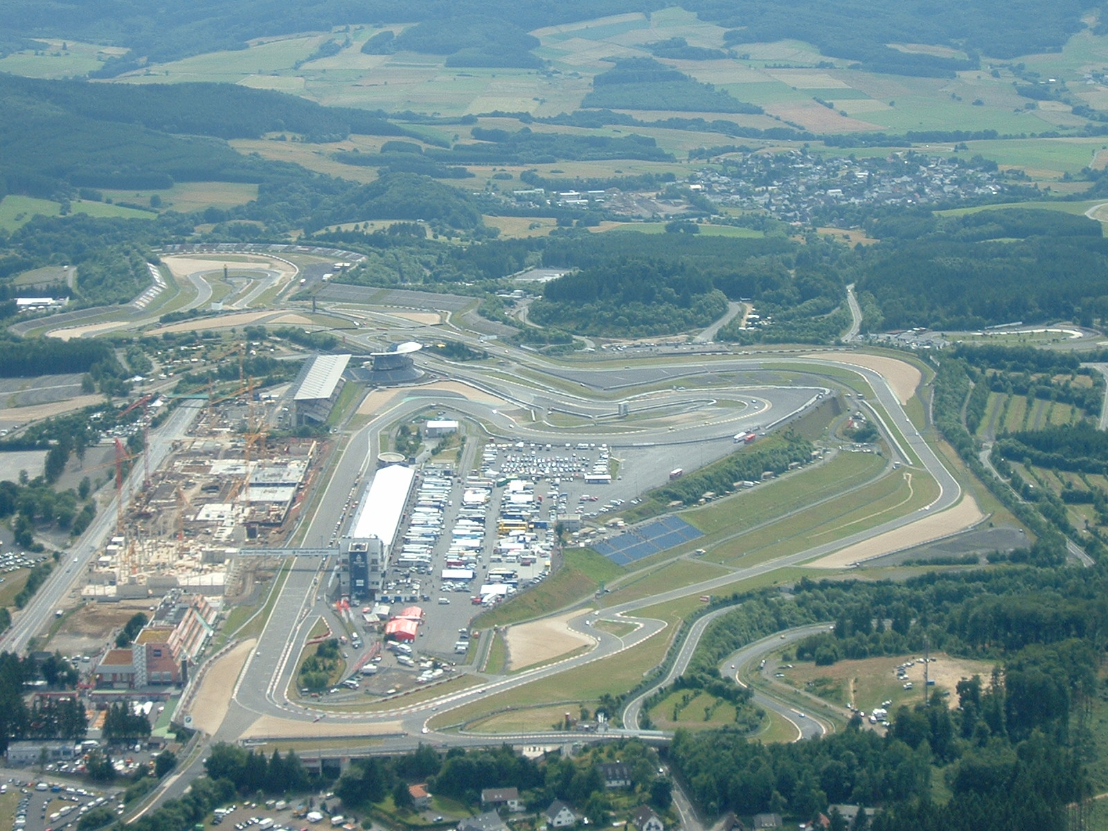 Nürburgring aus der Luft 2008 (Bauarbeiten)